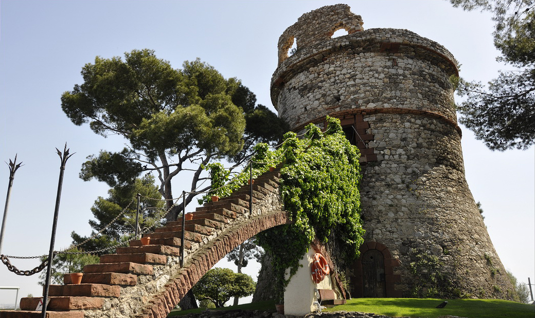 La Barona avui forma parrt de l'hotel Don Jaime